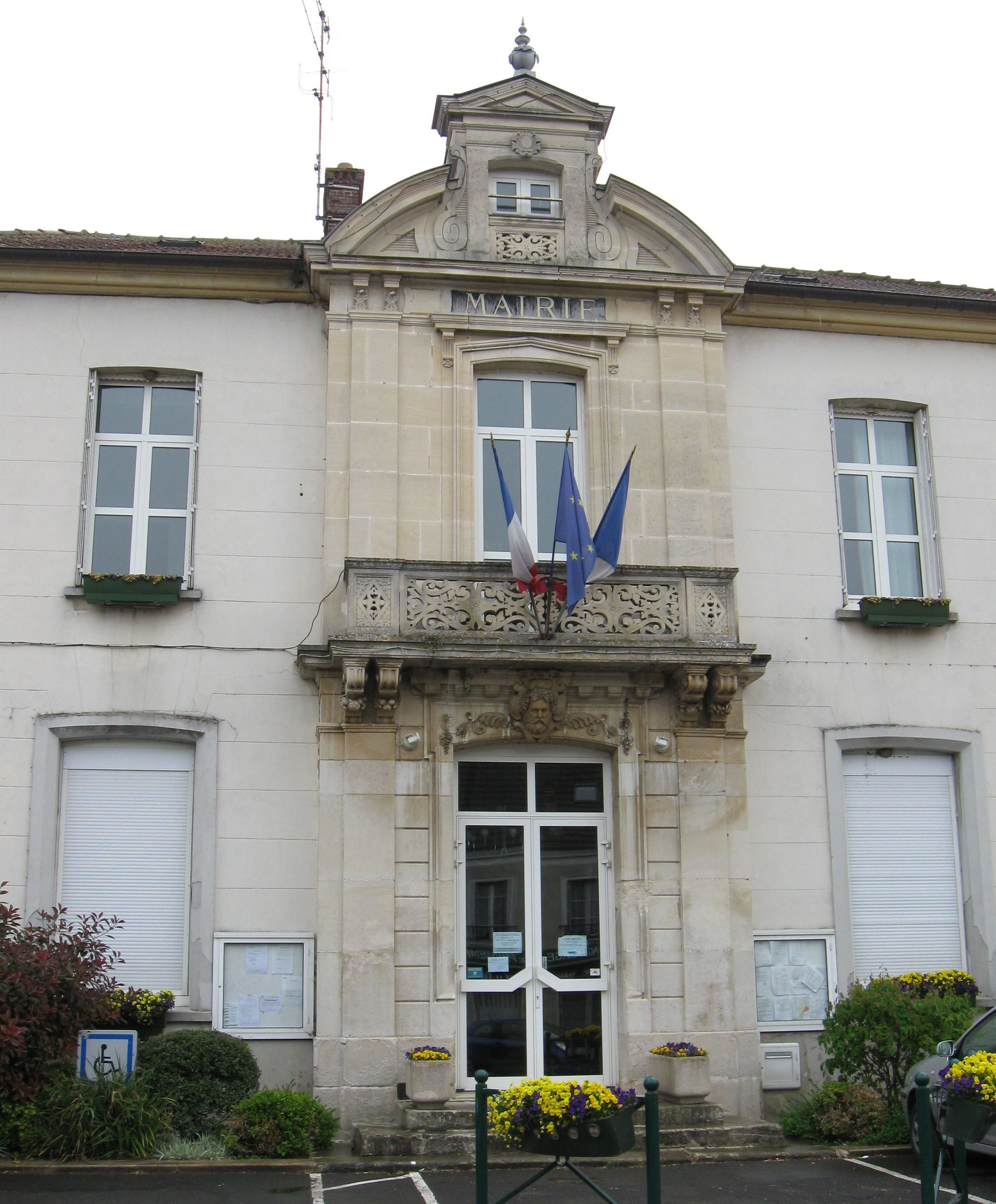 Mairie de Guérard. (Seine-et-Marne, région Île-de-France).